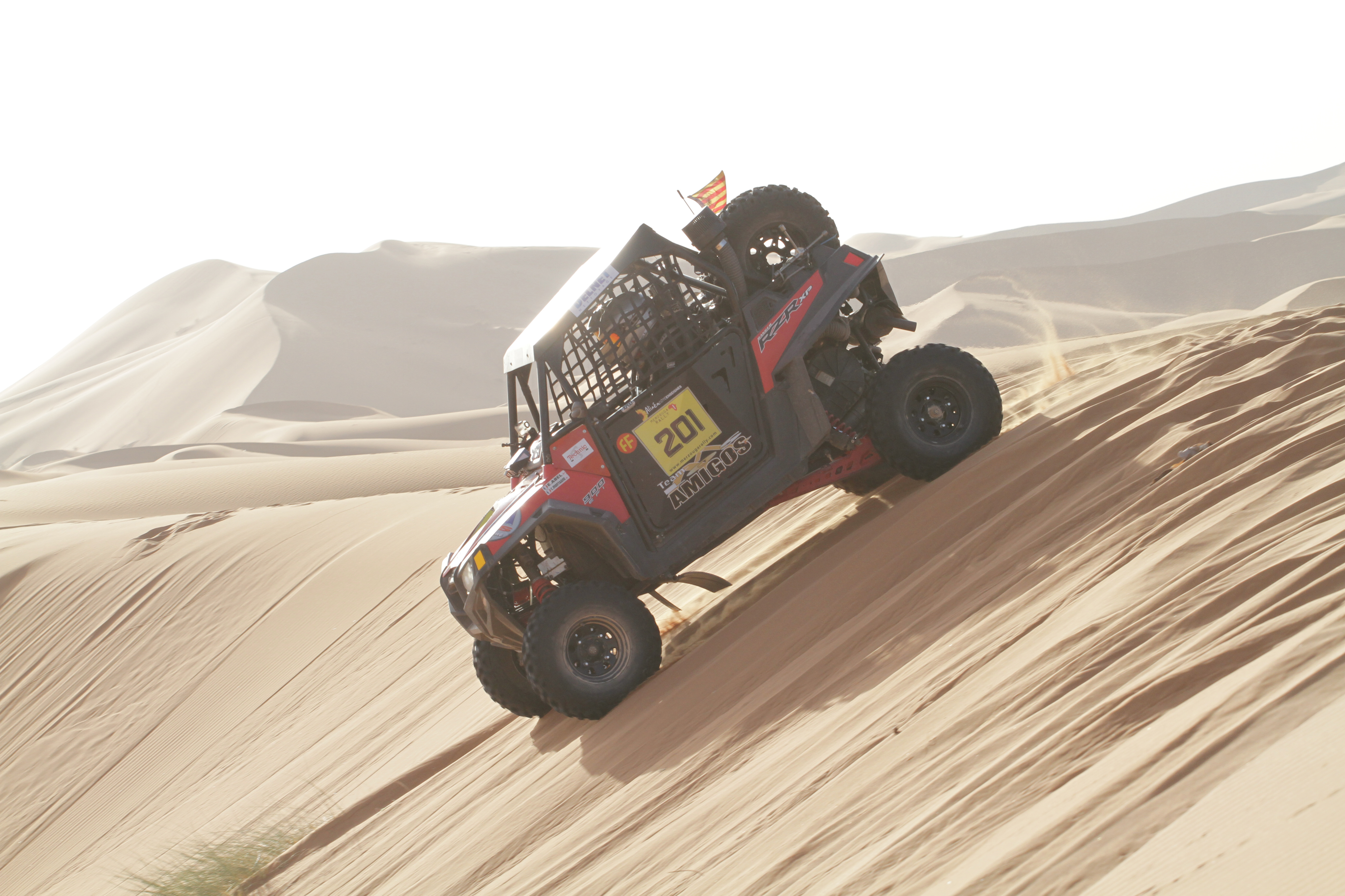 I mezzi della categoria SSV